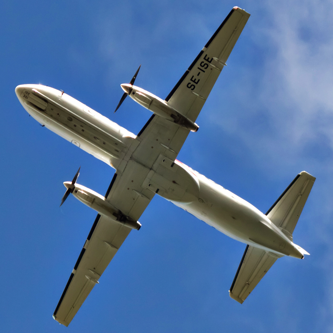 Saab 340 de Nextjet despegando do aeroporto de Visby.